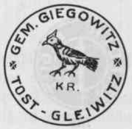 Altes Siegel der Gemeinde Giegowitz im Kreis Tost-Gleiwitz.